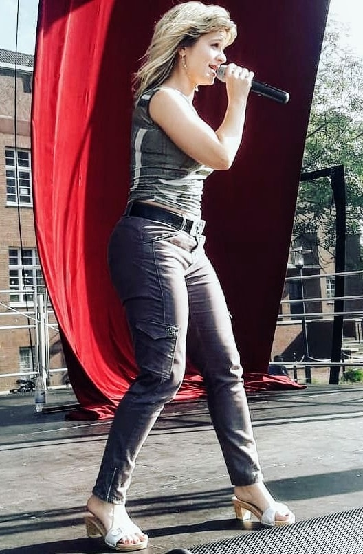 Sabrina Stern auf der Bühne